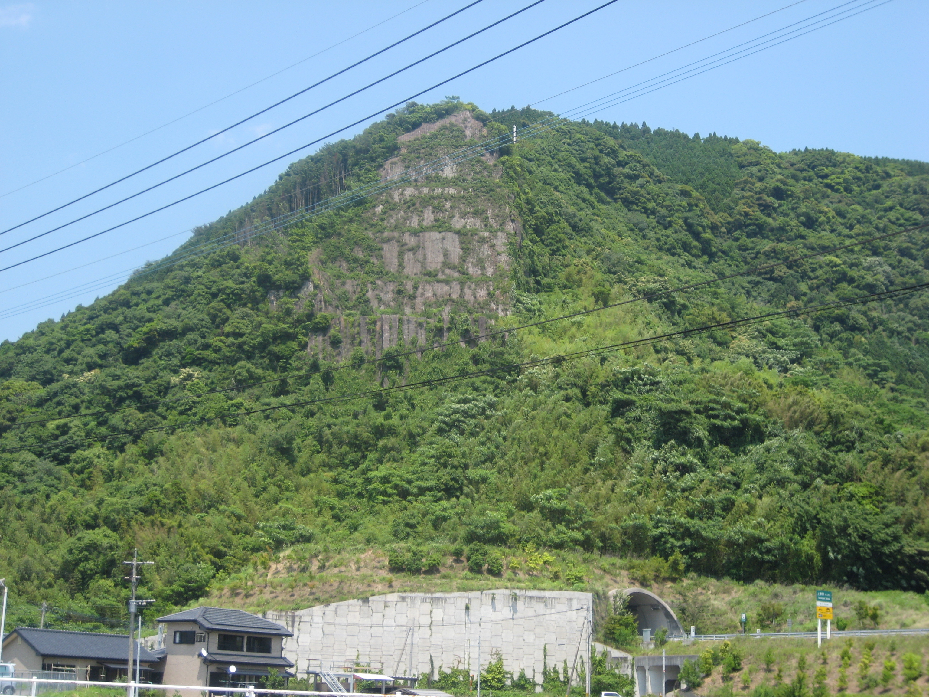 霧島市国分敷根にある剱岩。現在は東回り九州自動車道のトンネル建設の際崩落防止の為削り取られ、かつての勇壮な岩山は見られなくなった。